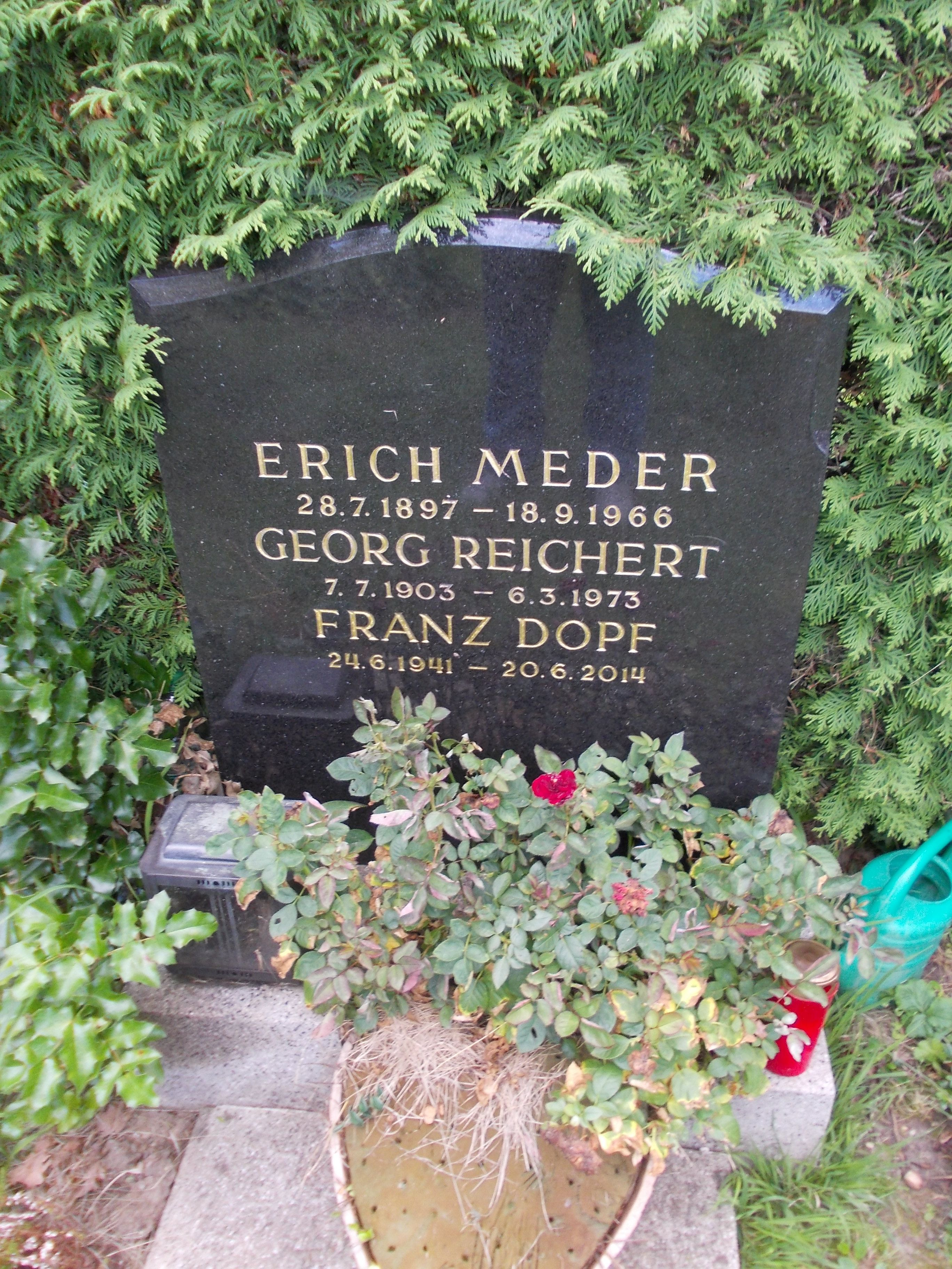 Erich Meder-Feuerhalle Simmering (7-3-7-111)